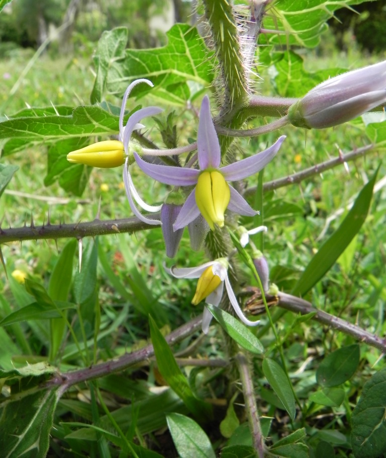 Solanum palinacanthum - SOLANACEAE - SQN 311 - Brasília - Distrito Federal - Brasil.